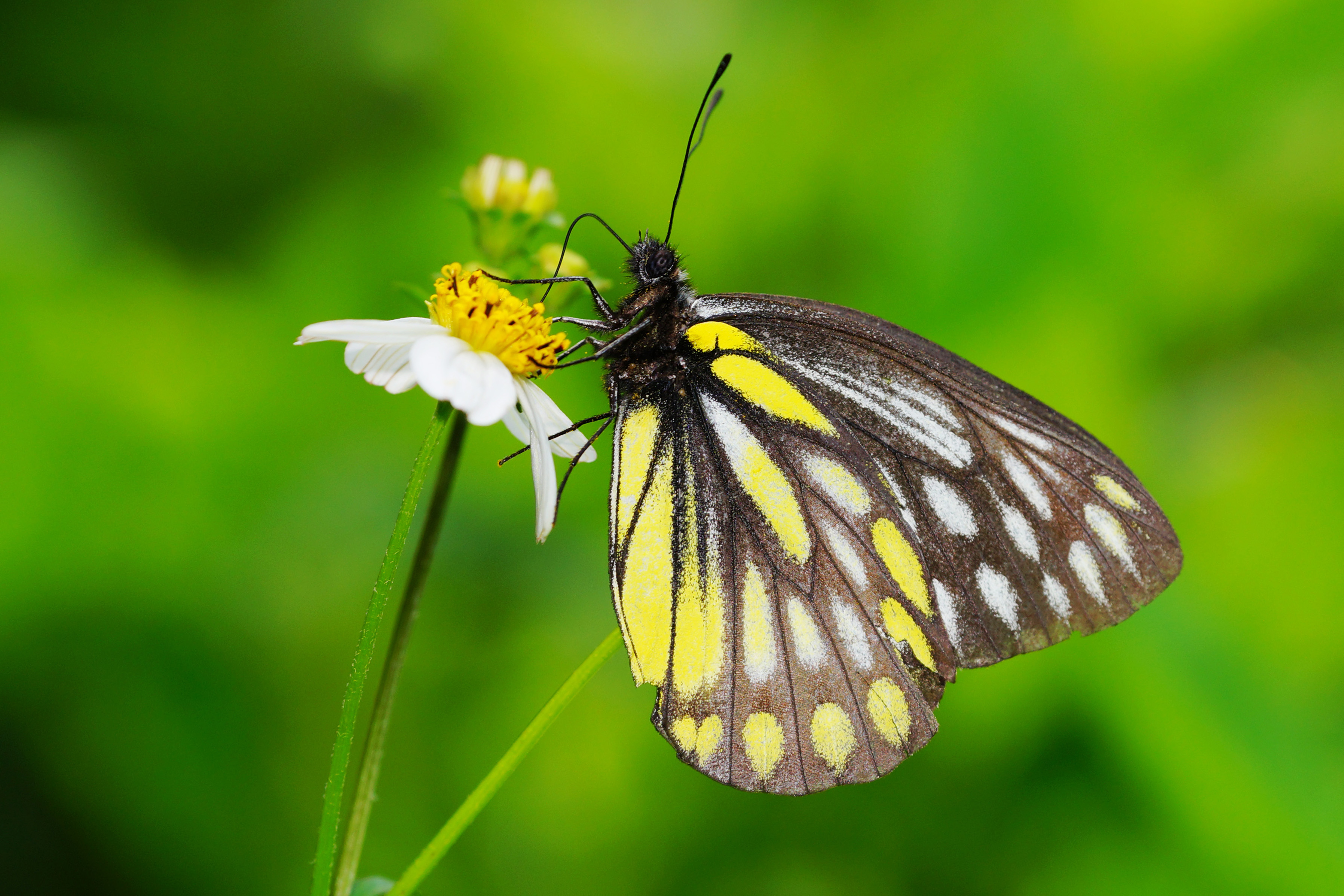 條斑豔粉蝶 Delias lativitta formosana